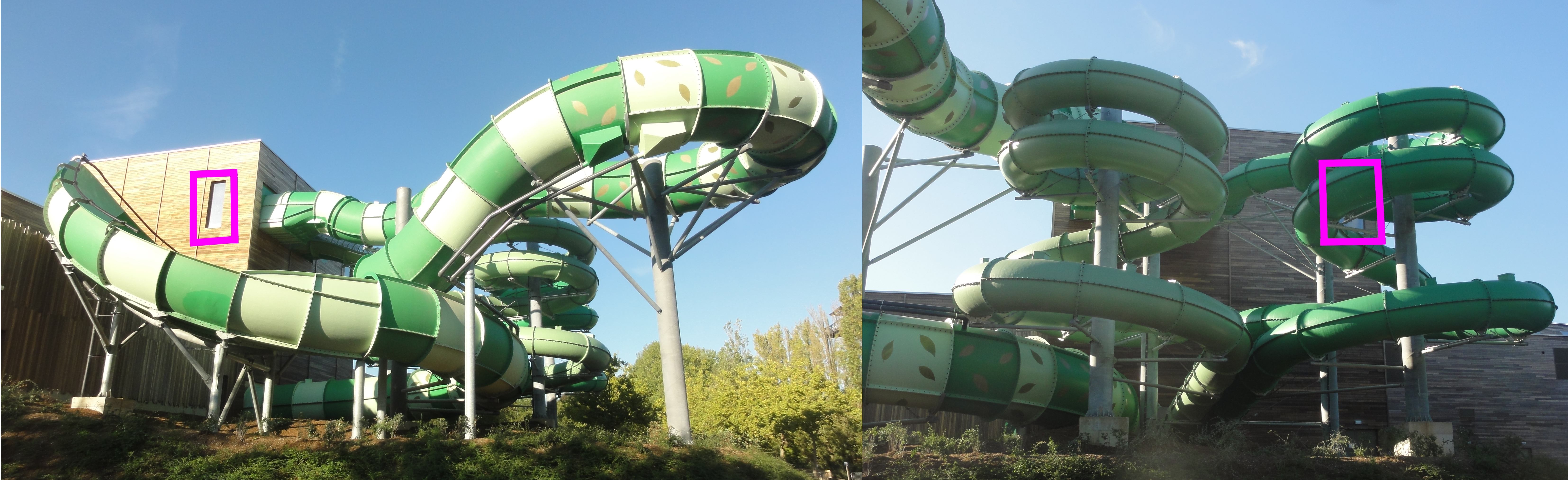 Depicted place: Bellewaerde Aquapark